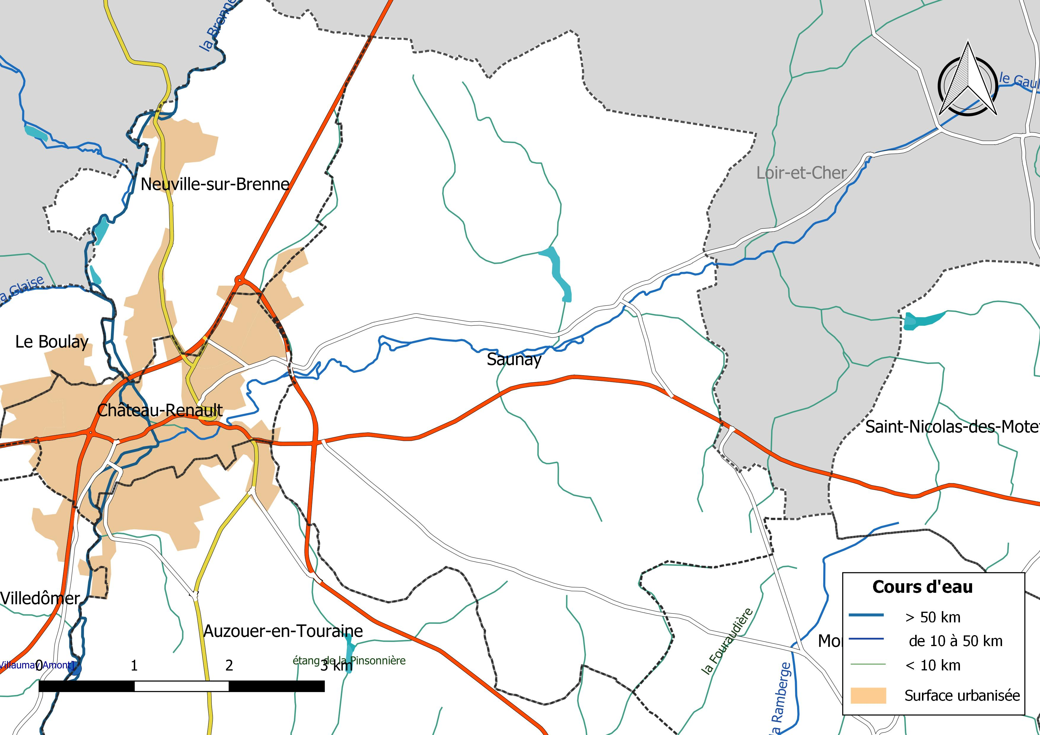 Carte du réseau hydrographique de la commune de Saunay (France).